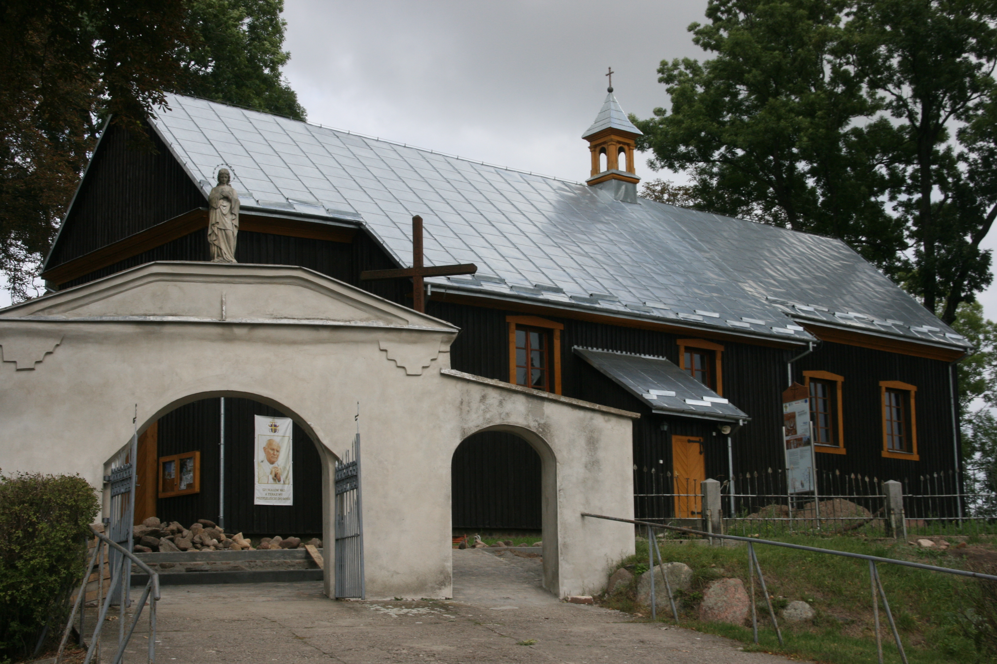 Węgra 20a - rzymskokatolicki pościół parafialny p.w. św. Jana Chrzciciela, 1730